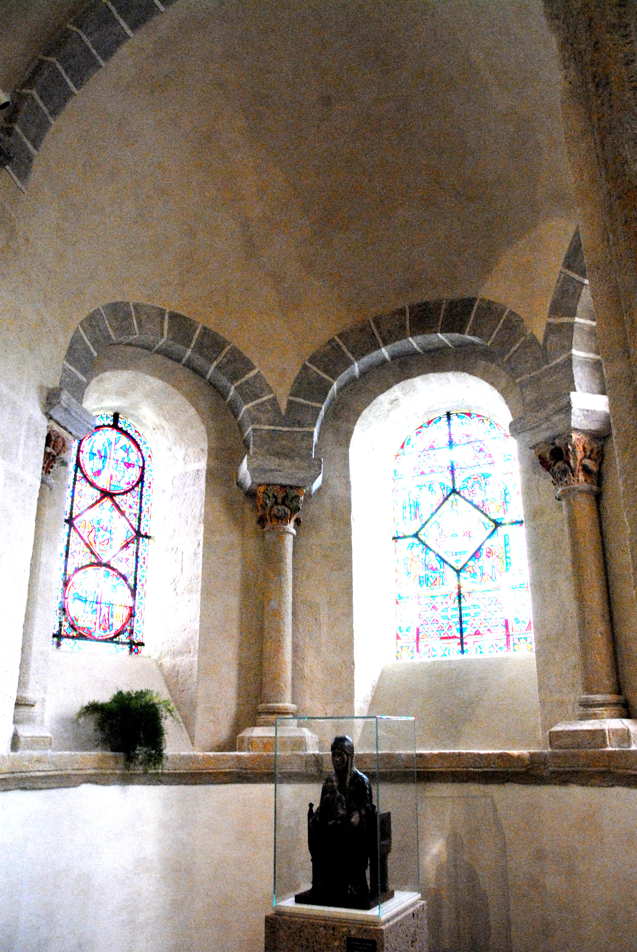 St.-Nectaire, Umgangskapelle mit Madonna